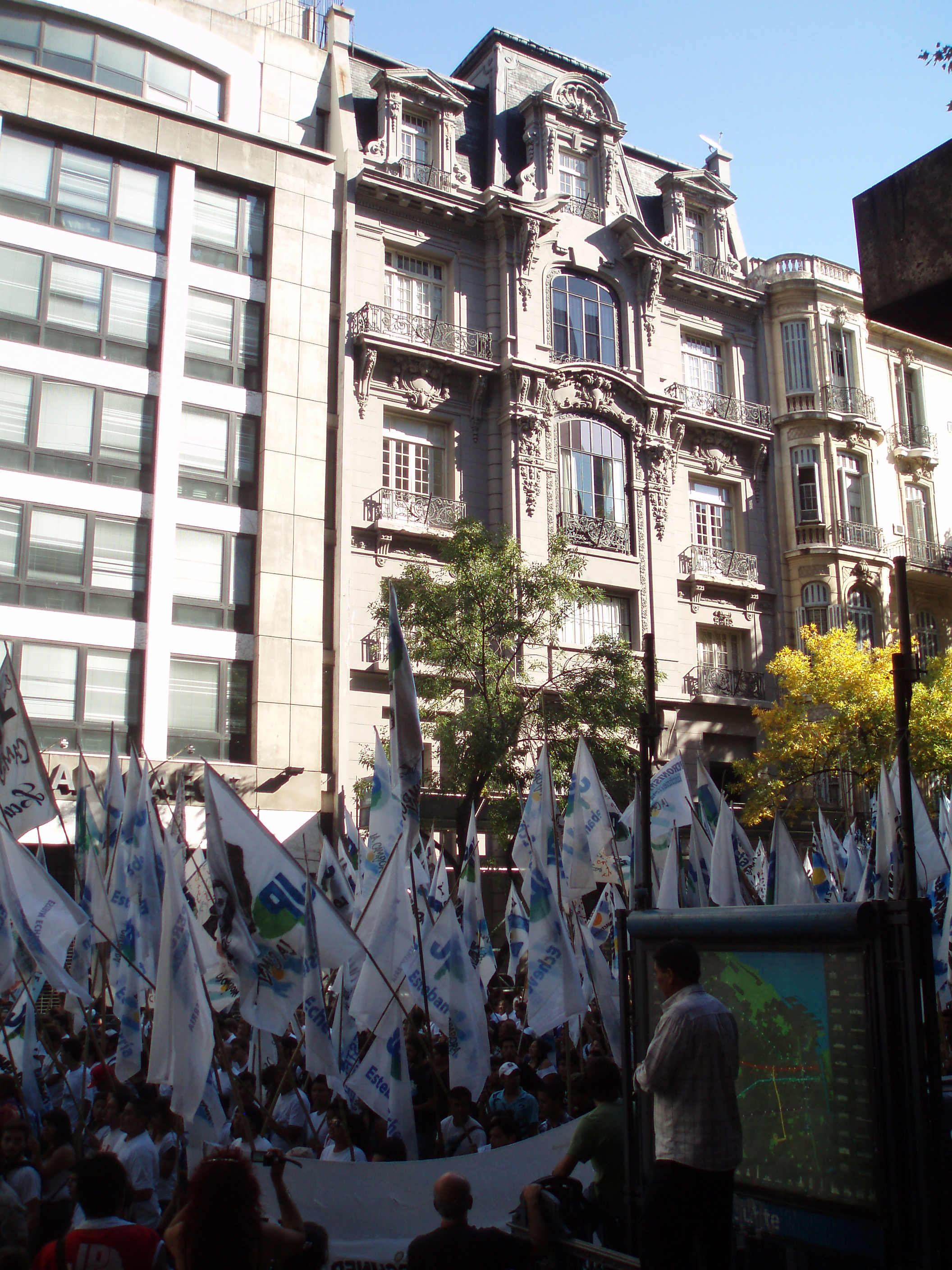 La Cámpora el 24 de marzo de 2013.